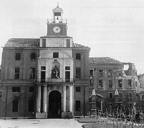 Cortile d'onore danneggiato dai bombardamenti del 1943